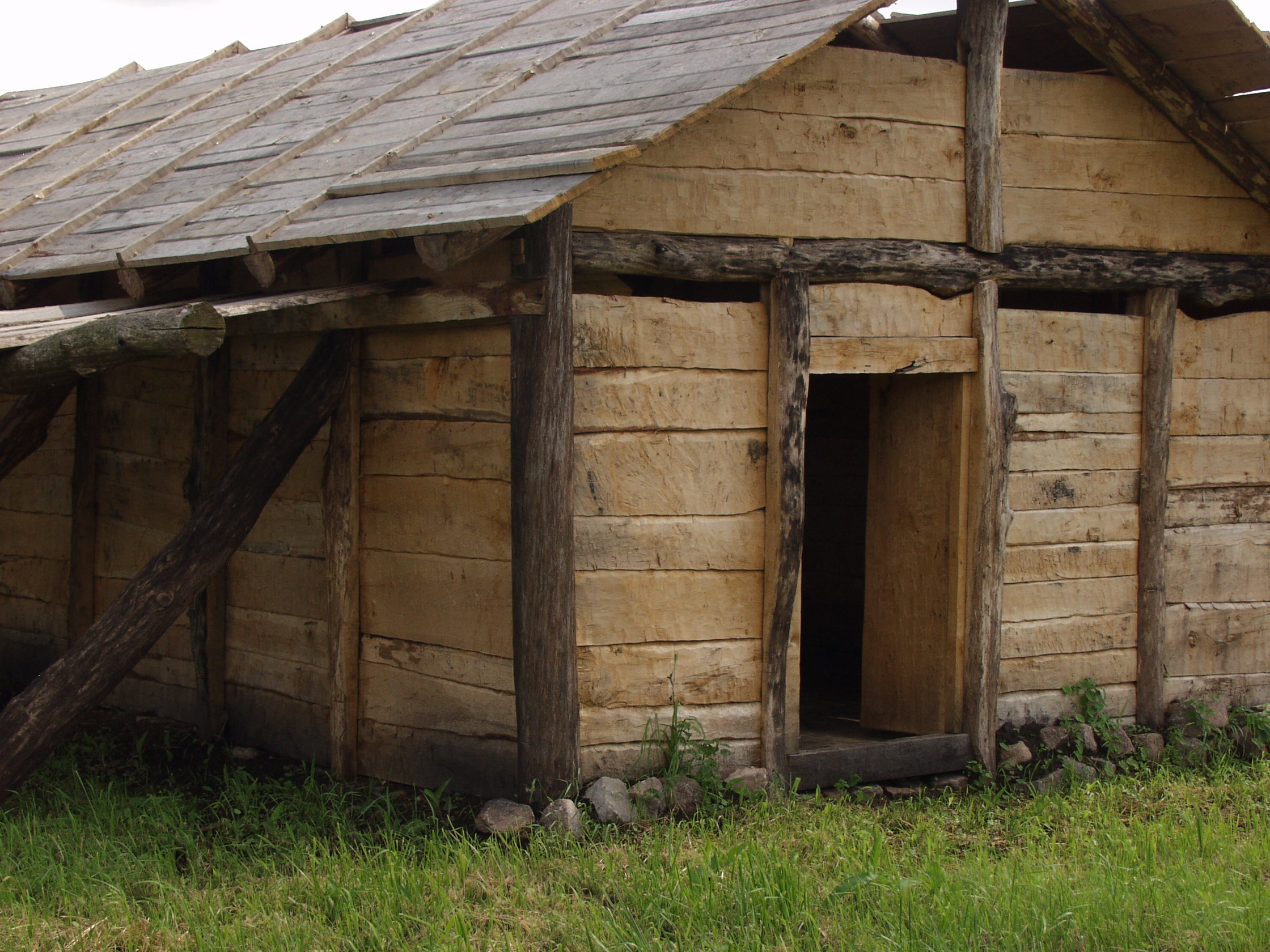 Unfertiges Blockbohlenhaus im Freilichtmuseum Ukranenland